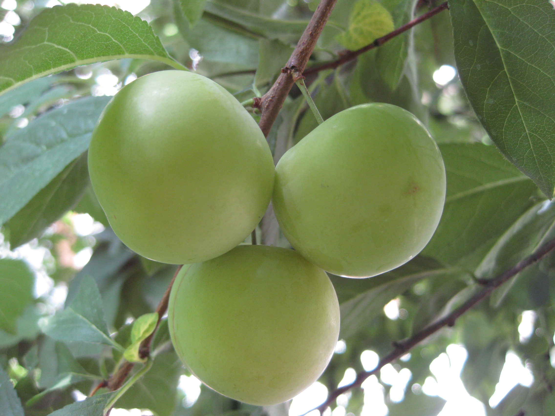 Rusticani sull'alberto ancora acerbi all'inizio di giugno